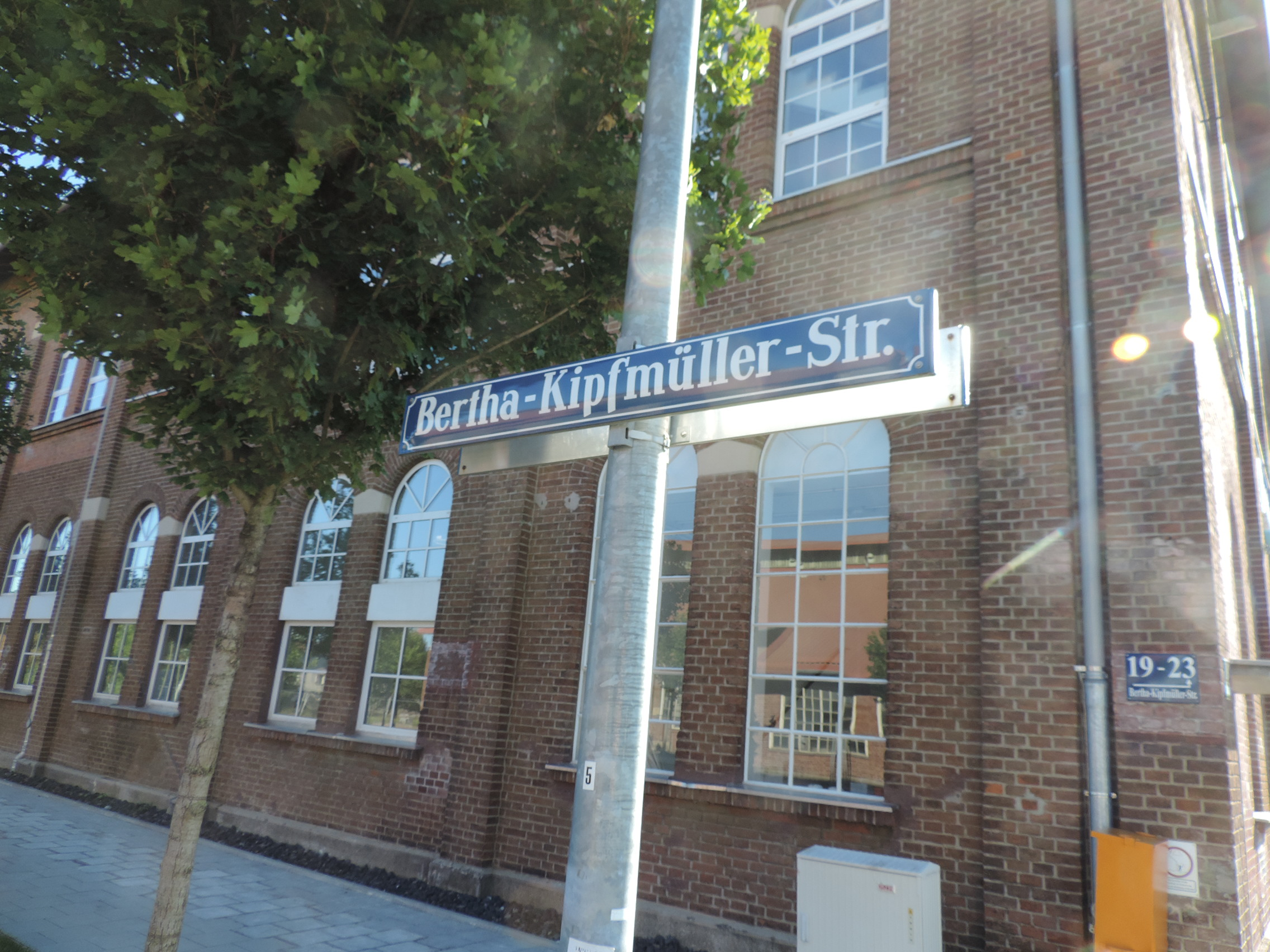 Im Münchner Stadtbezirk Aubing-Lochhausen-Langwied ist eine Staße nach Bertha Kipfmüller benannt.